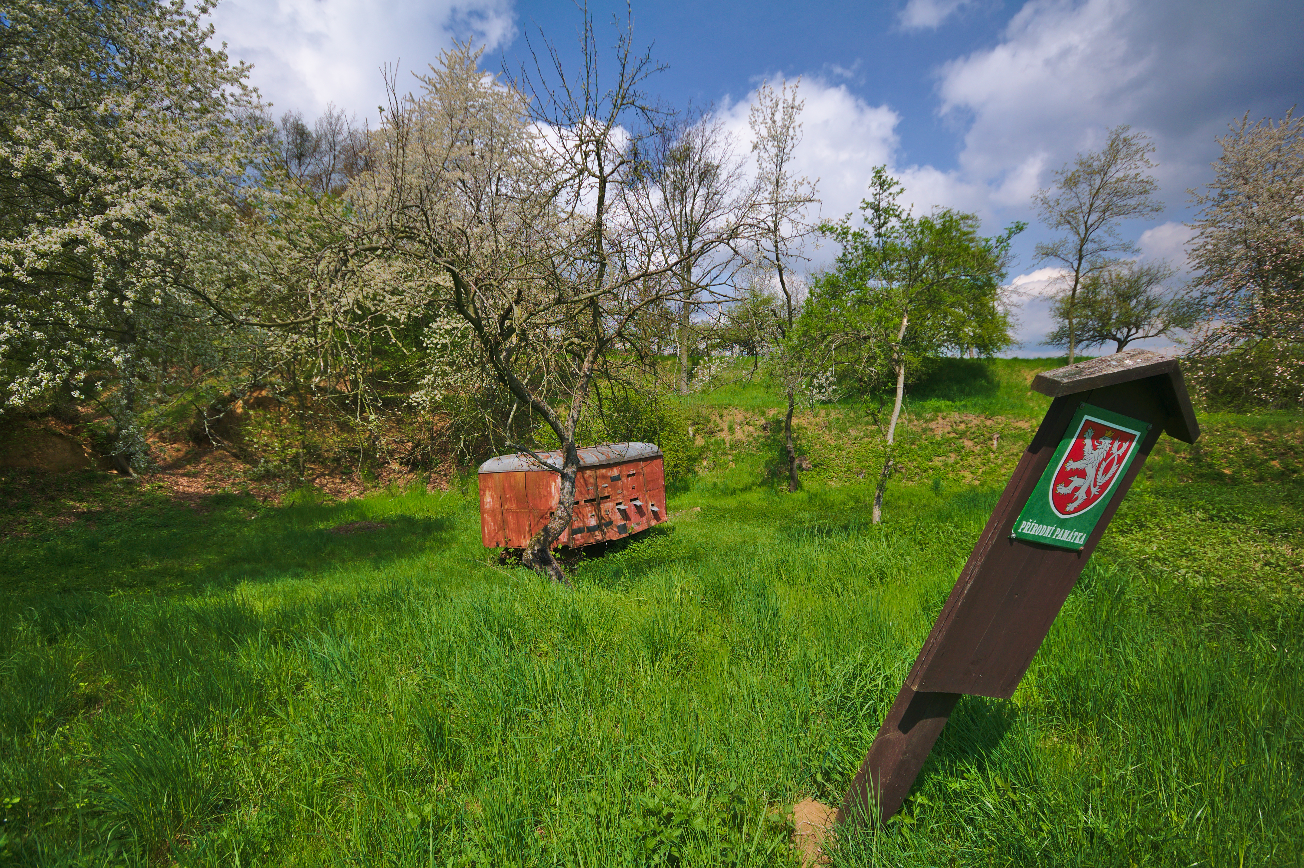 Přírodní památka Dolní vinohrádky, okres Prostějov